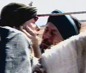 wamadat07